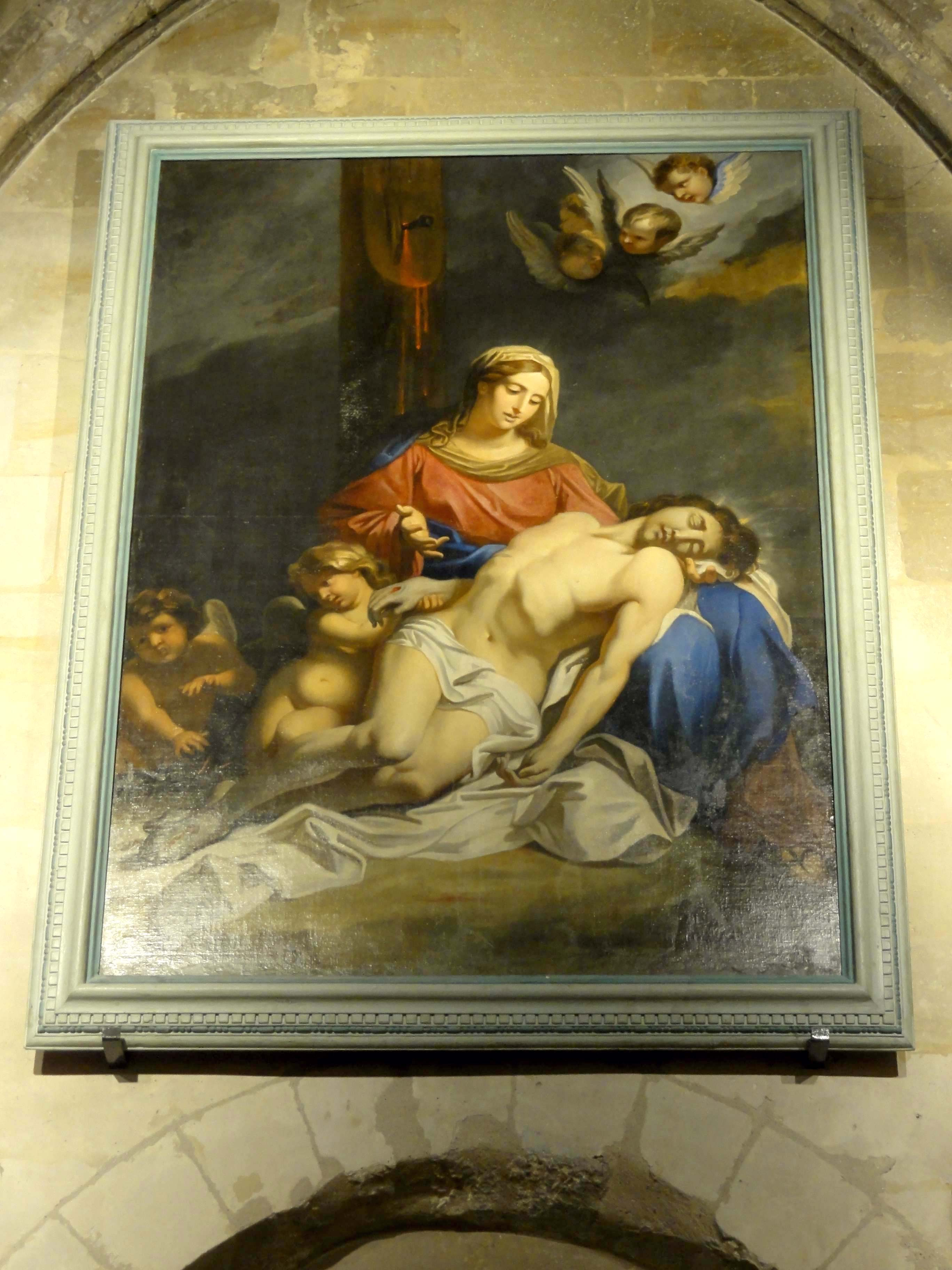 Mobilier de l'église - voir titre.